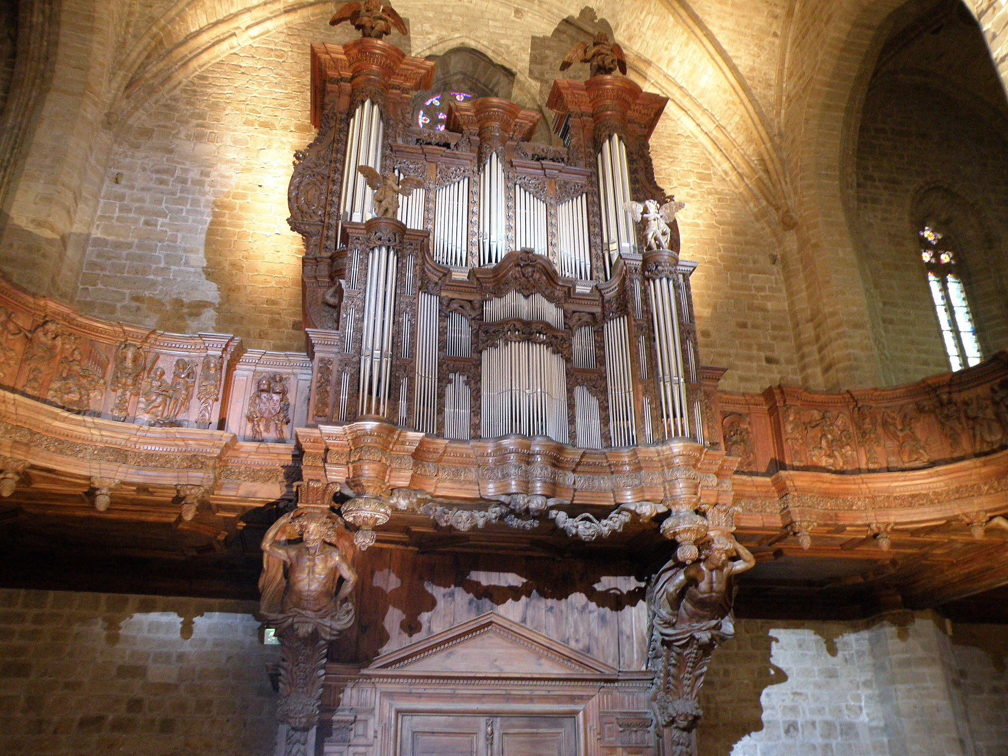 La Chaise-Dieu, dép. de la Haute-Loire, France (Auvergne). Église abbatiale: orgues.